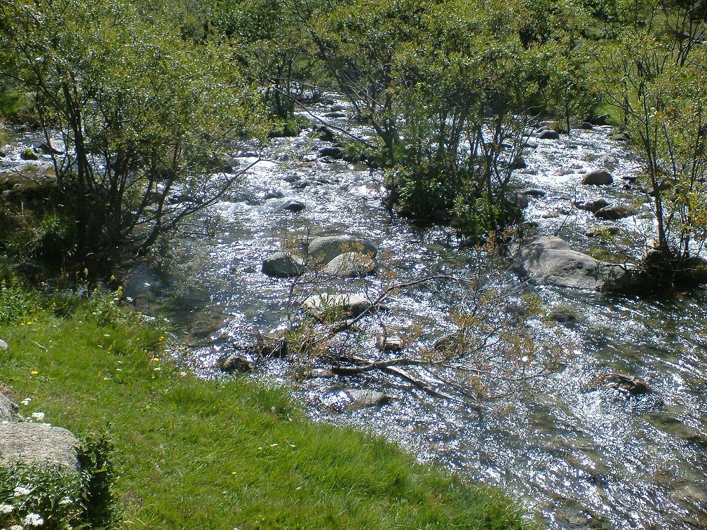 Riu de Sant Nicolau; la Vall de Boí, Alta Ribagorça, Catalunya